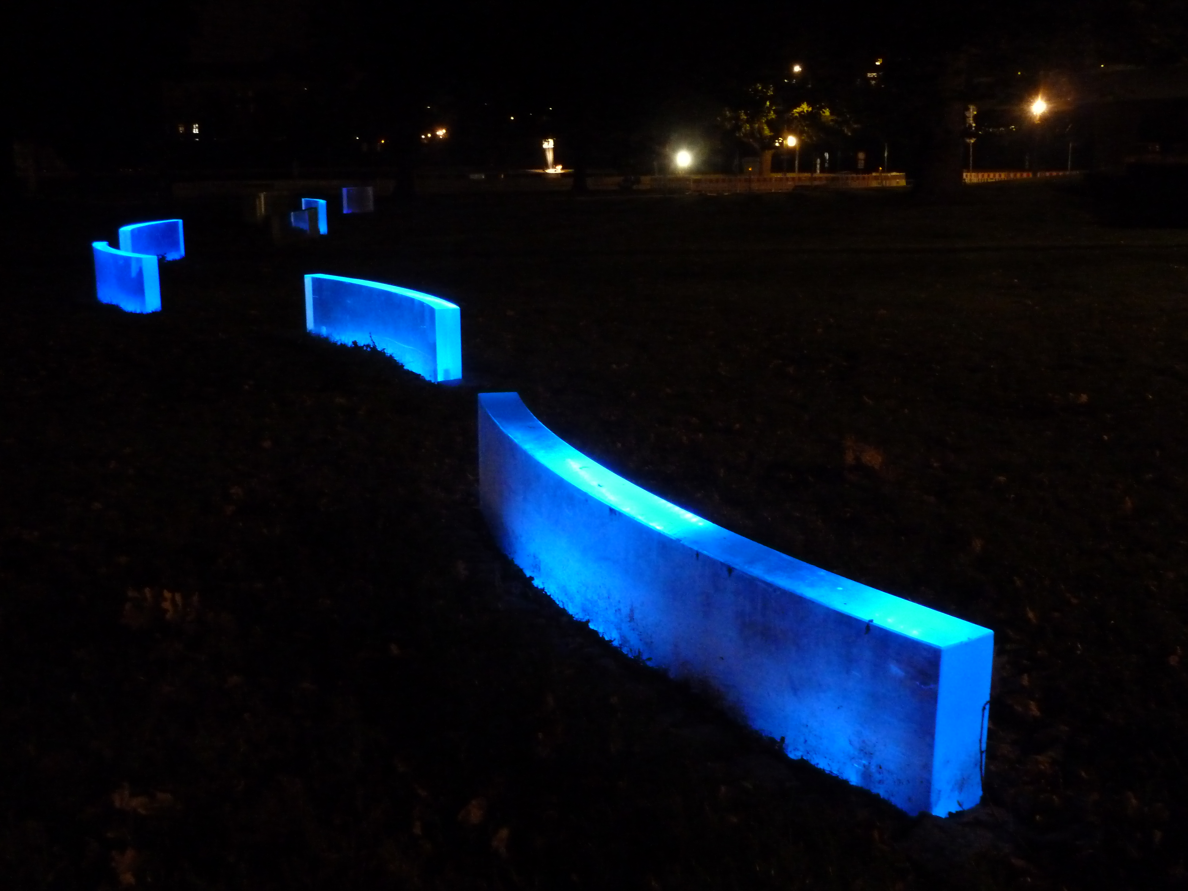 Der Verlauf des nun unterirdisch verrohrten Kaitzbachs in Dresden wird nahe der Synagoge durch nachts leuchtende Glaselemente angezeigt.